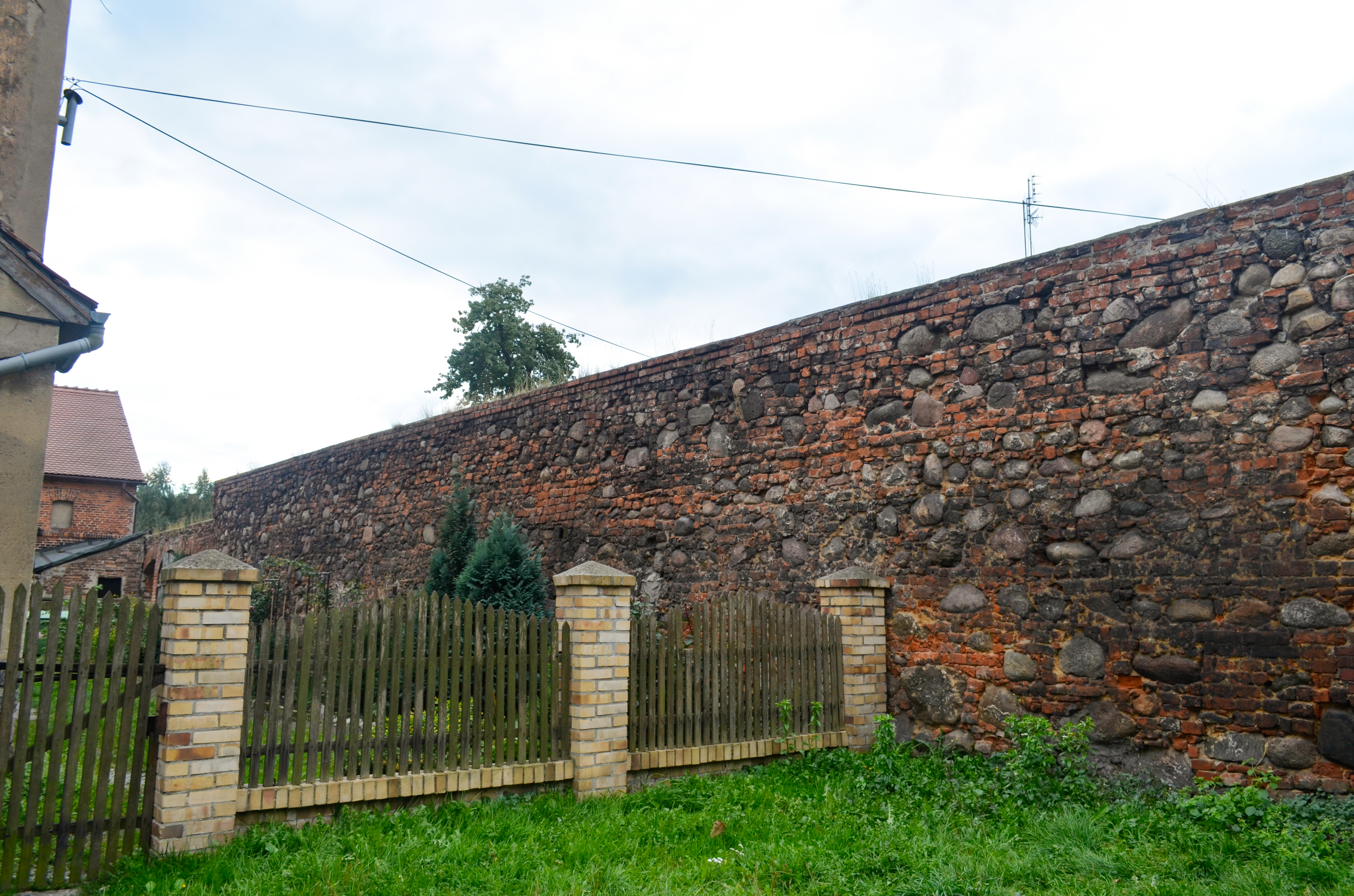 Sulechów, mury obronne